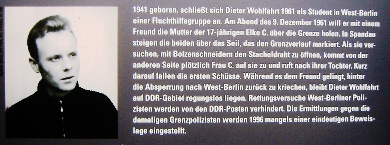 Informationssäulen am Finkenkruger Weg in Berlin-Staaken. Die Aufnahmen zeigen Fotos zur Zeit der Deutschen Teilung. Abgebildet sind unter anderem Menschen, die an der Grenze zu Tode kamen.